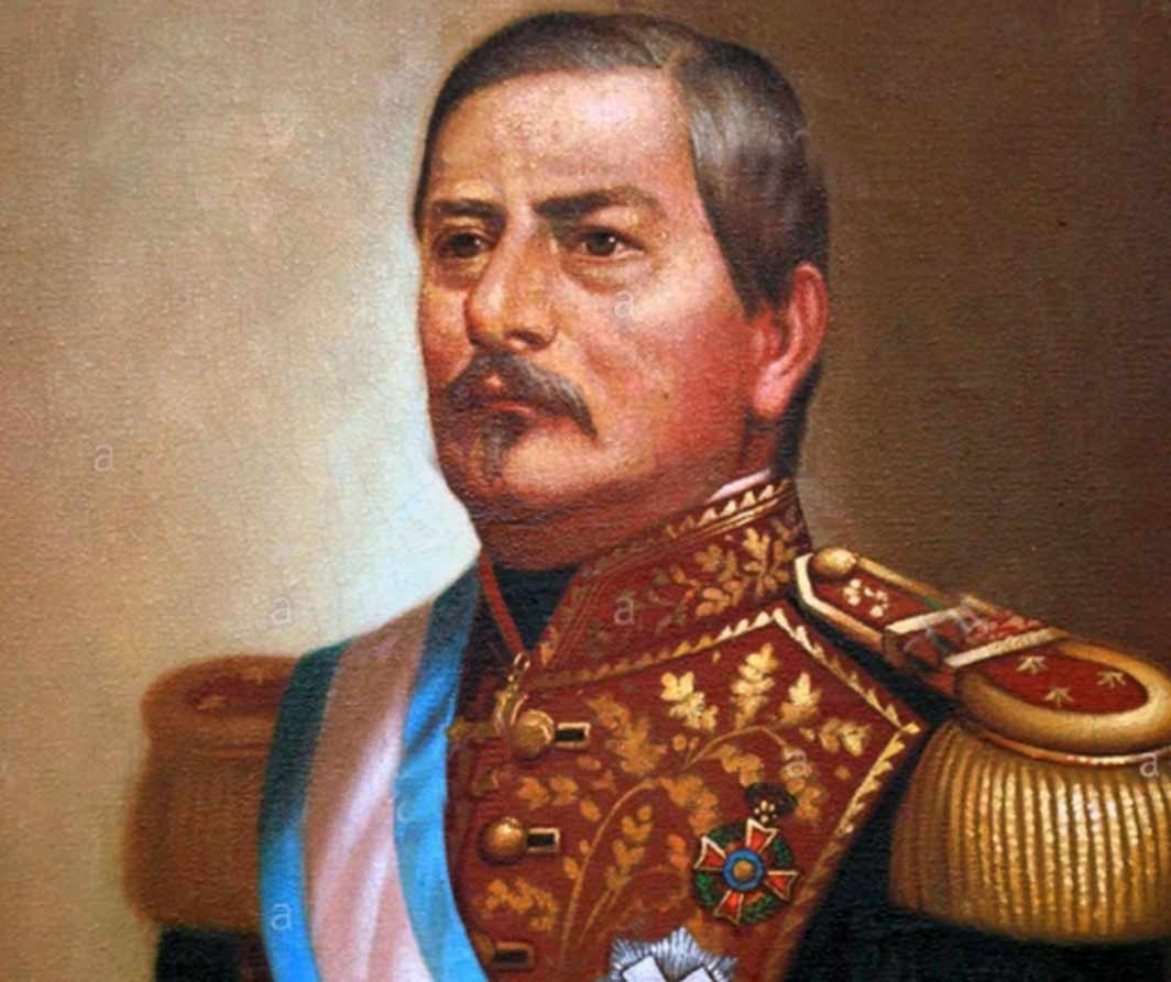 Fue conocido por su preocupación por las relaciones internacionales y se le atribuye la introducción de la producción de café en el Salvador